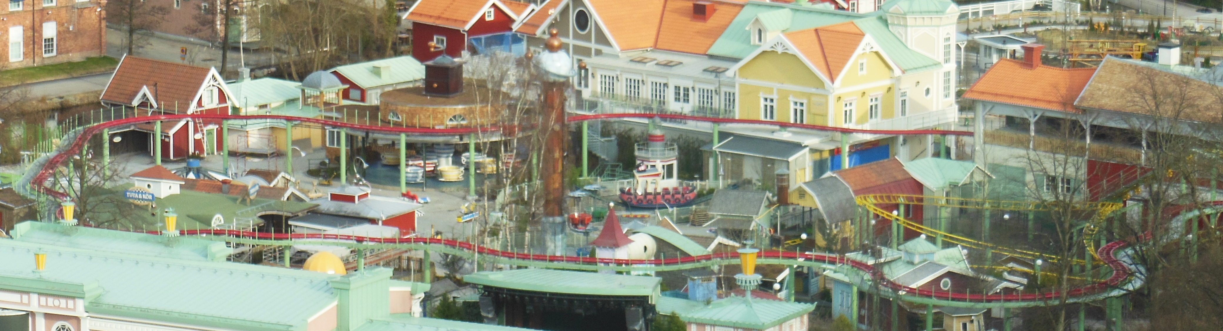 Kaninlandsbanans spår sett från Gothia Towers.